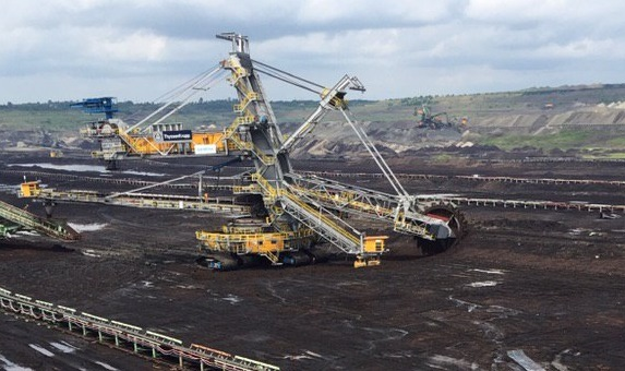 Роторни багер на пољу ,,Тамнава запар“- РБ ,,Колубара“